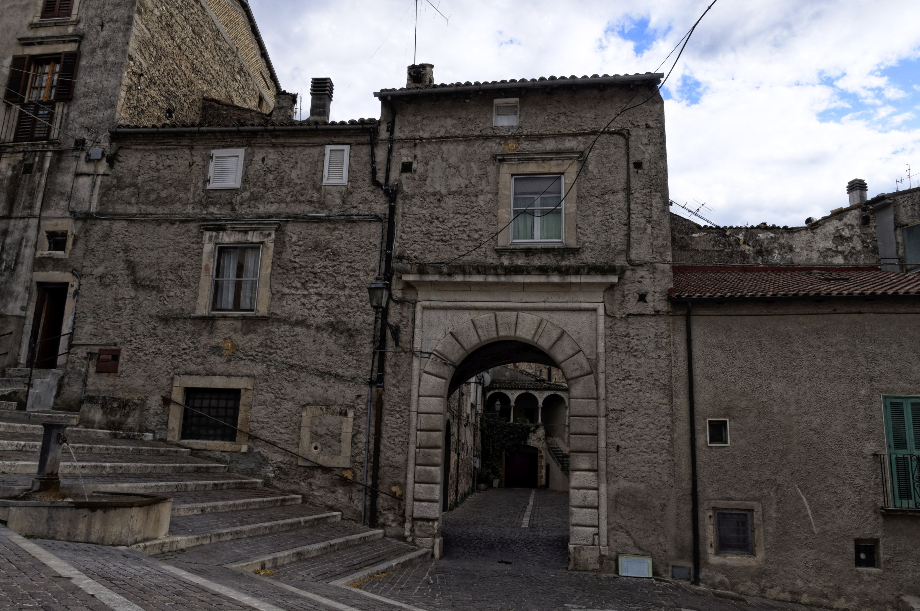 Popoli - 2017